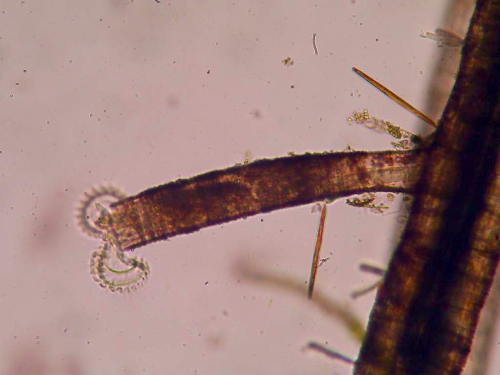 Limnias sp.：ワツミワムシ属の１種 2016/07/31 和歌山県田辺市：Tanabe City. Wakayama Pref. Japan